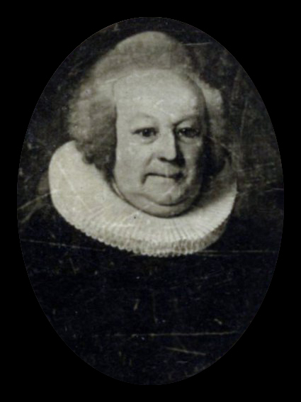 Format: Fotopositiv Dato / Date: Ukjent (før 1920) Fotograf / Photographer: Erik Olsen (1835 - 1920) Sted / Place: Trondheim Wikipedia: Nidaros Bispedømme Wikipedia: Marcus Fredrik Bang Eier / Owner Institution: Trondheim byarkiv, The Municipal Archives of Trondheim Arkivreferanse / Archive reference: Tor.H41.B45.F3295 Marcus Frederik Bang, født 1711, død 1789, dansk geistlig. Kom til Norge 1739 som hospitalsprest i Trondheim, biskop over Trondheim stift 1773–87. Ble et forbilde for J. N. Brun som predikant. Utgav Offentlige Taler over Aftensangteksterne (1767). Kilde: Store Norske Leksikon , artikkelforfatter redaksjonen.